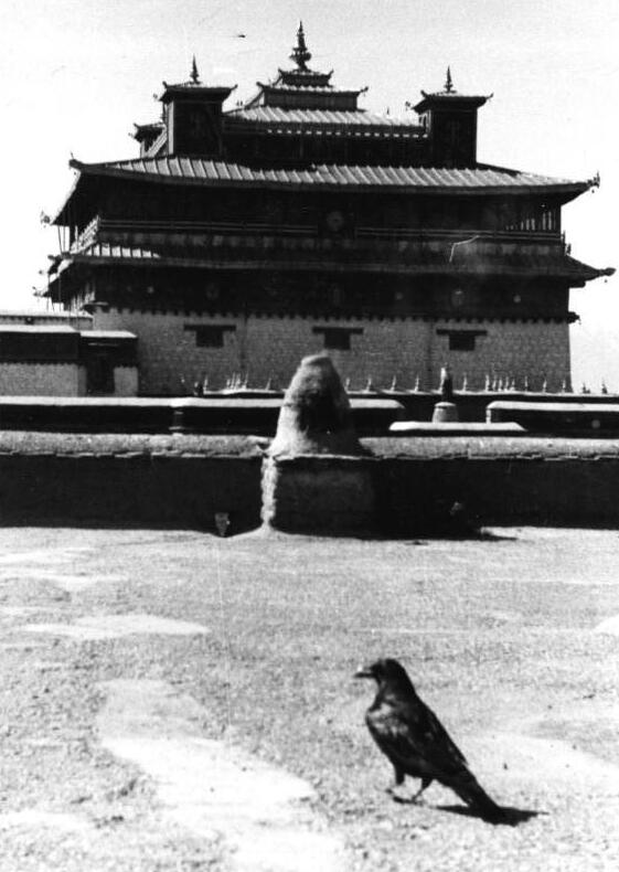 Samyeh, Kloster